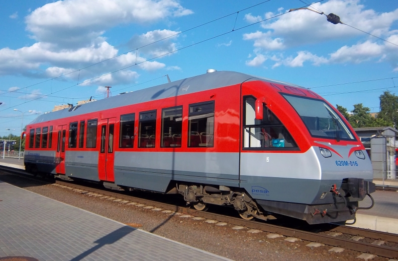 Automotrisė PESA 620M